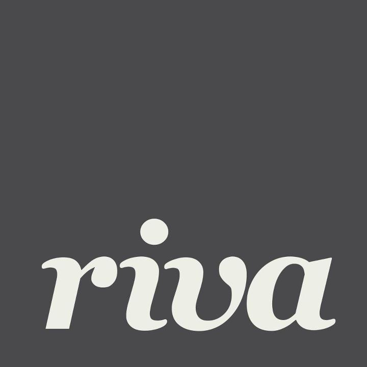 Logotipo da Riva desenhado por Giovanni Bianco